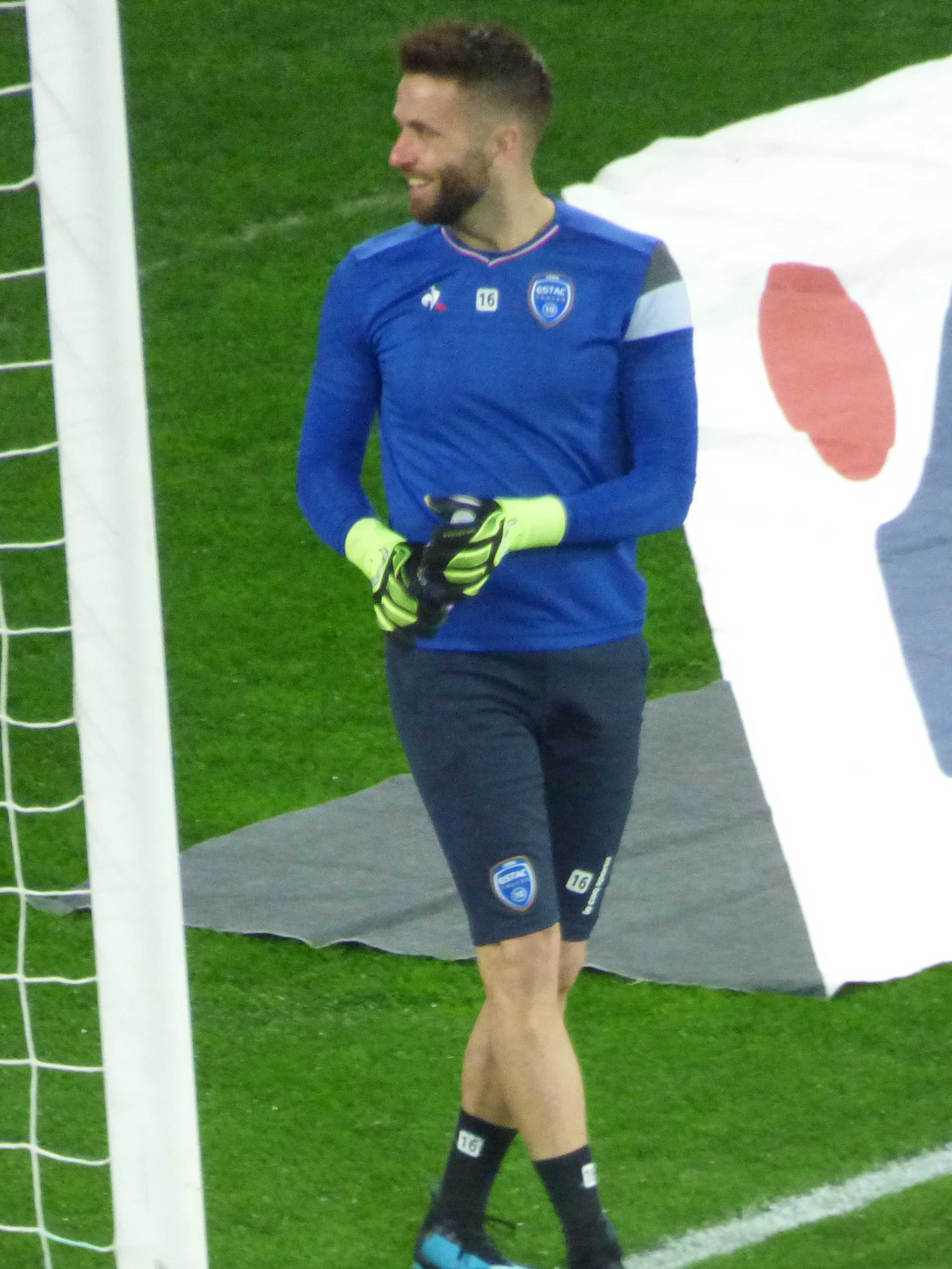 Sébastien Renot lors du match RC Lens / ES Troyes AC, comptant pour la vingt-troisième journée du championnat de France de football de Ligue 2 2019-2020, le 4 février 2020, au Stade Bollaert-Delelis de Lens